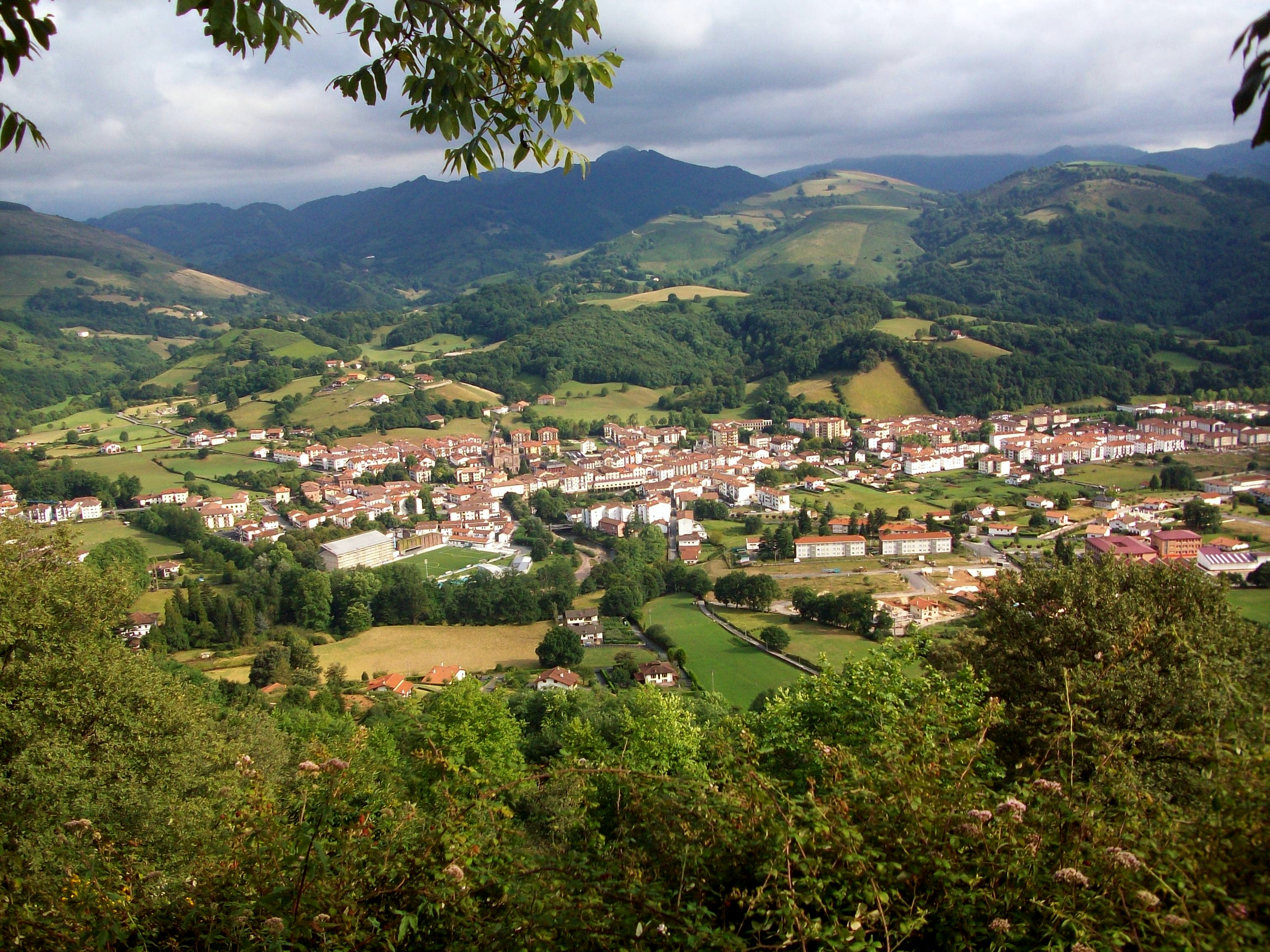 Baztango Elizondo herria. Nafarroa, Euskal Herria. Elizondo village in Baztan. Navarre, Basque Country.